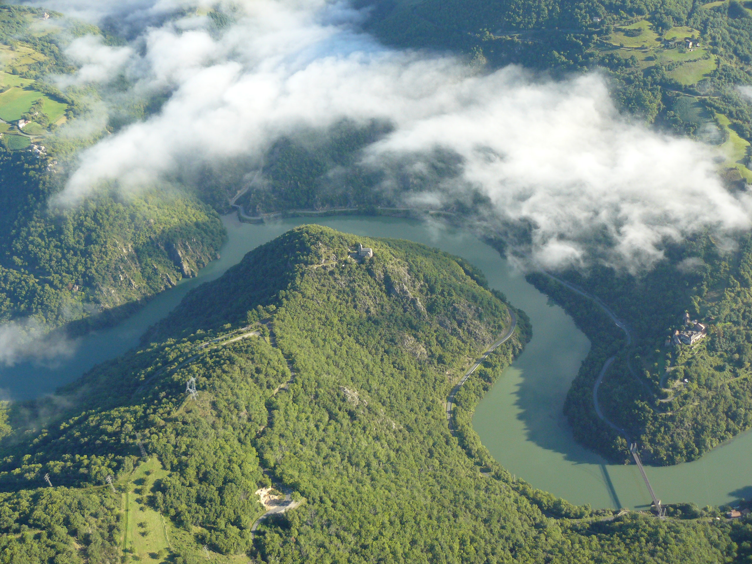 Gorges du Tarn